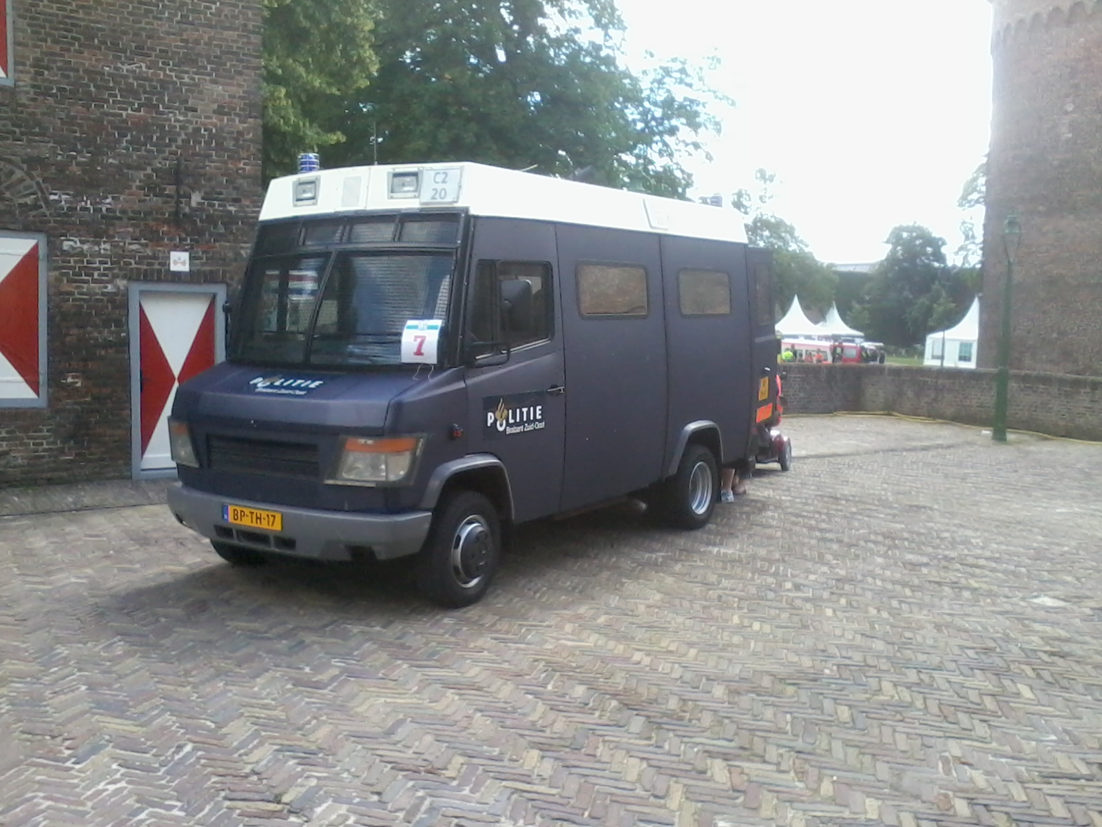 Voertuig van de Mobiele Eenheid van Nederland